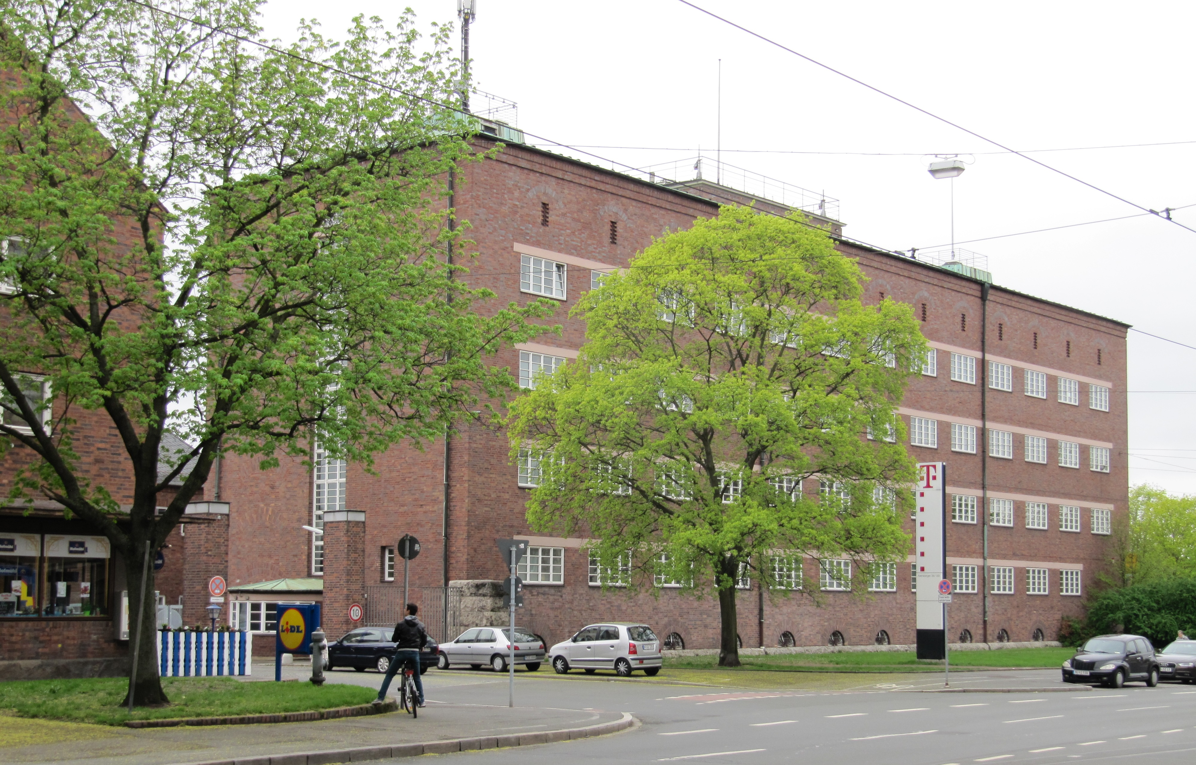 Nürnberger Poststadt ist ein ausgedehntes Betriebsgelände der ehemaligen Reichspost mit Betriebswohnungen